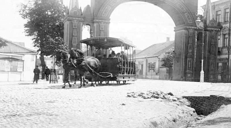 Tramwaj konny na ul. Lipowej w Białymstoku